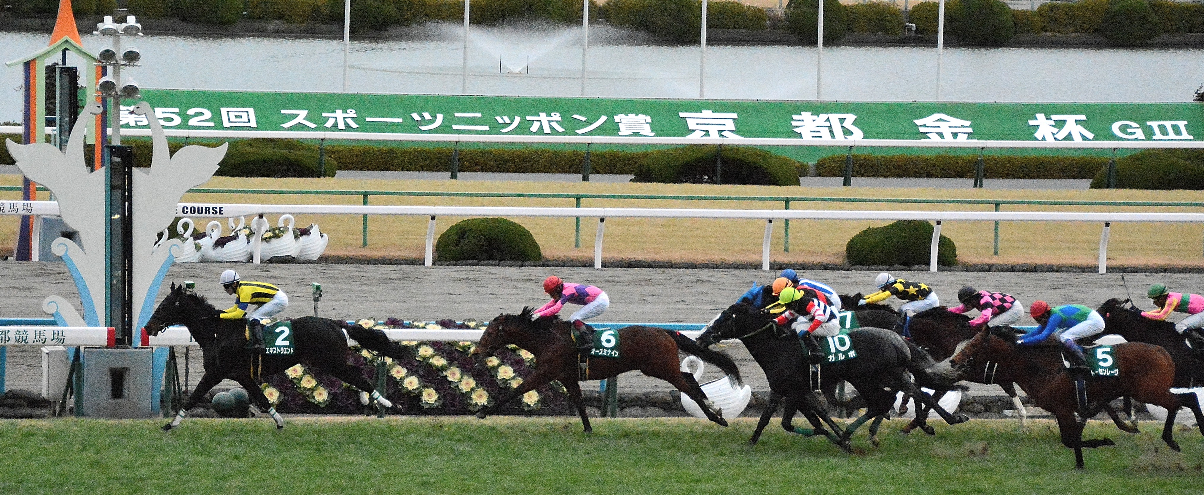 2014年1月5日に京都競馬場の第11競走で行われた、第52回スポーツニッポン賞京都金杯(GIII)で、ゴール板前でレースが決着する瞬間を、観客席であるグランドスワンから撮影したもの。